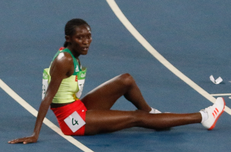 Rio de Janeiro - A queniana Vivian Jepkemoi Cheruiyot vence final e bate recorde olímpico dos 5 mil metros nos Jogos Rio 2016, no Estádio Olímpico (Fernando Frazão/Agência Brasil)